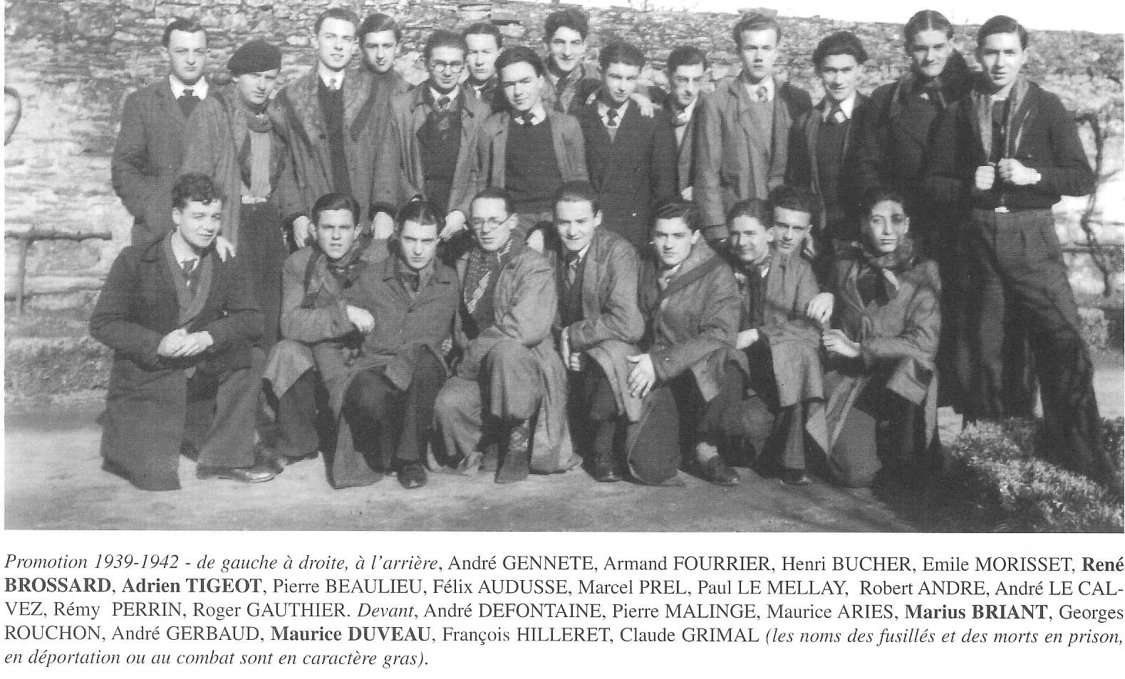 élèves maîtres promo 1939-1942 dont Adrien Tigeot et trois autres victimes de la Résistance Française